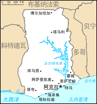 加纳地图。